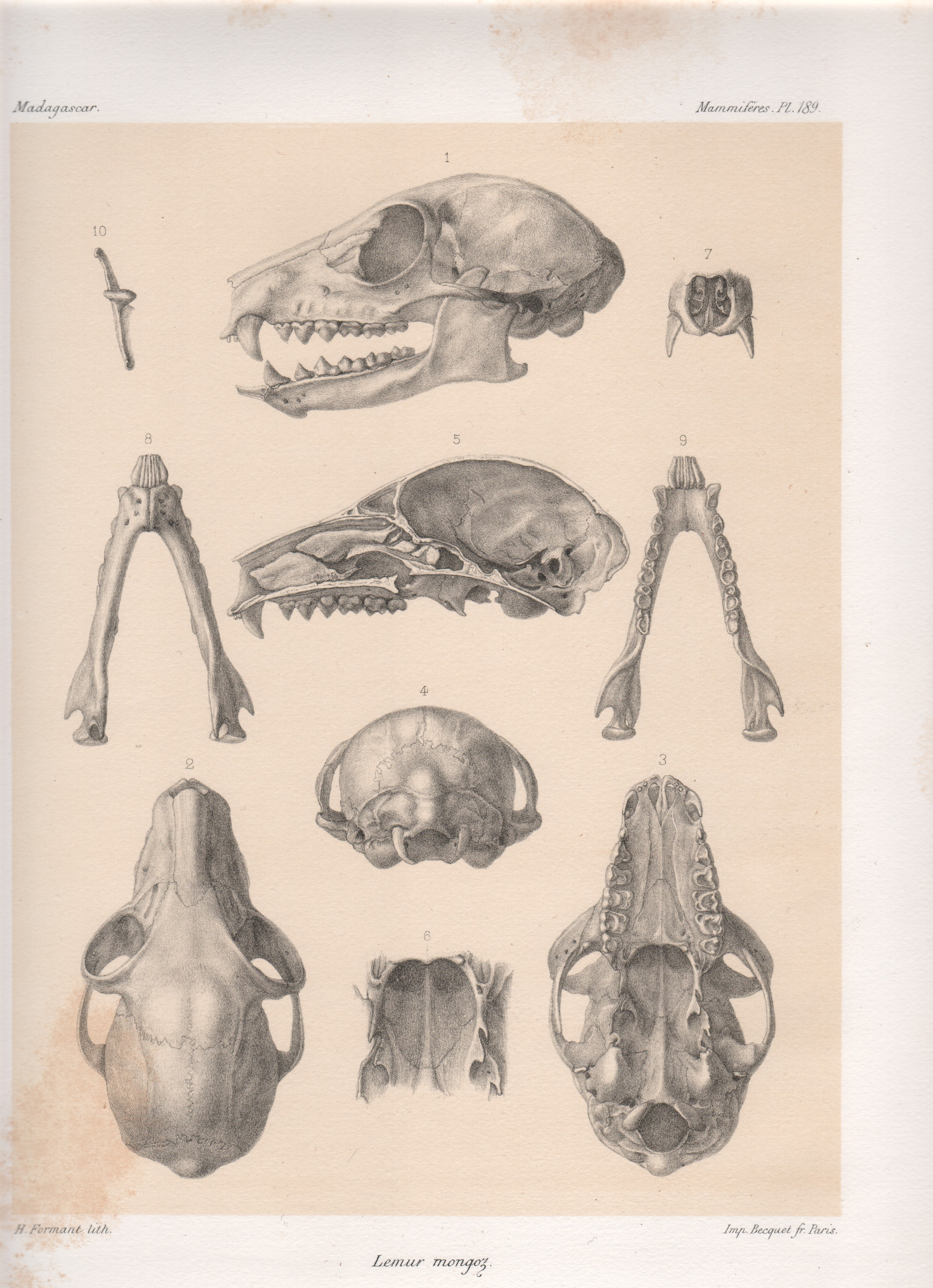 Mongozmaki (Eulemur mongoz)